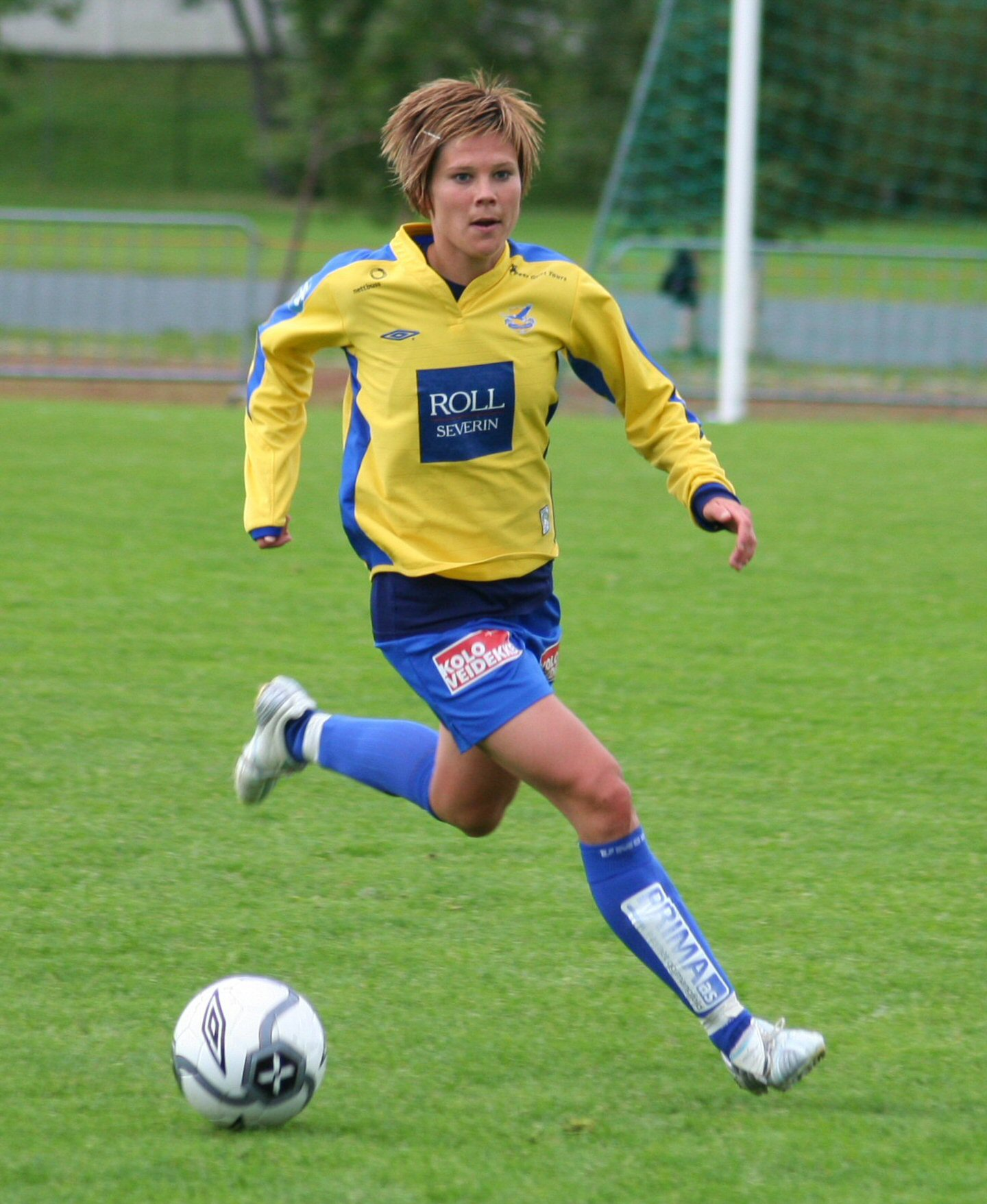 Fotballspilleren Trine Nordgård Stensaas